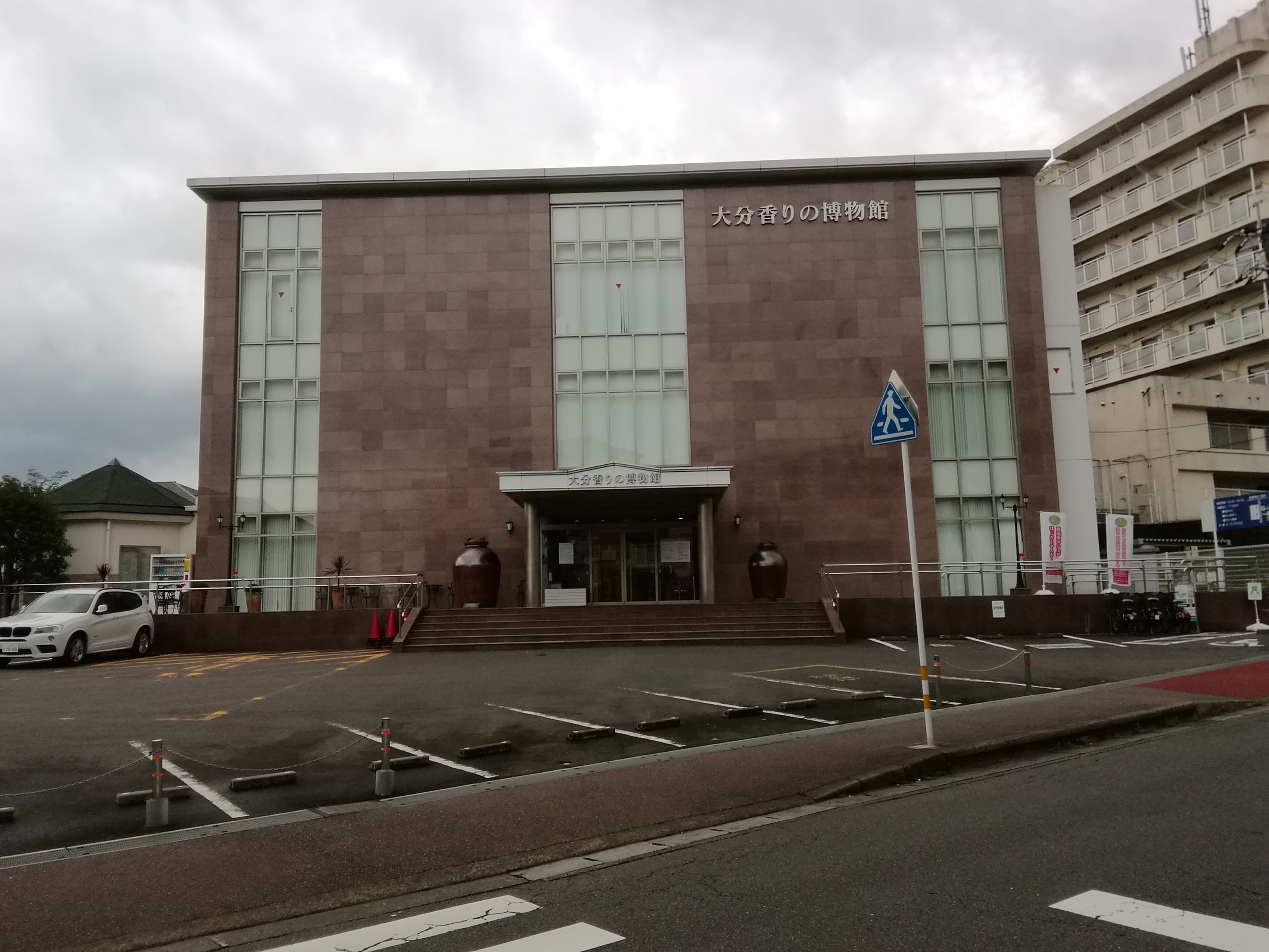 大分県別府市、大分香りの博物館建物外観